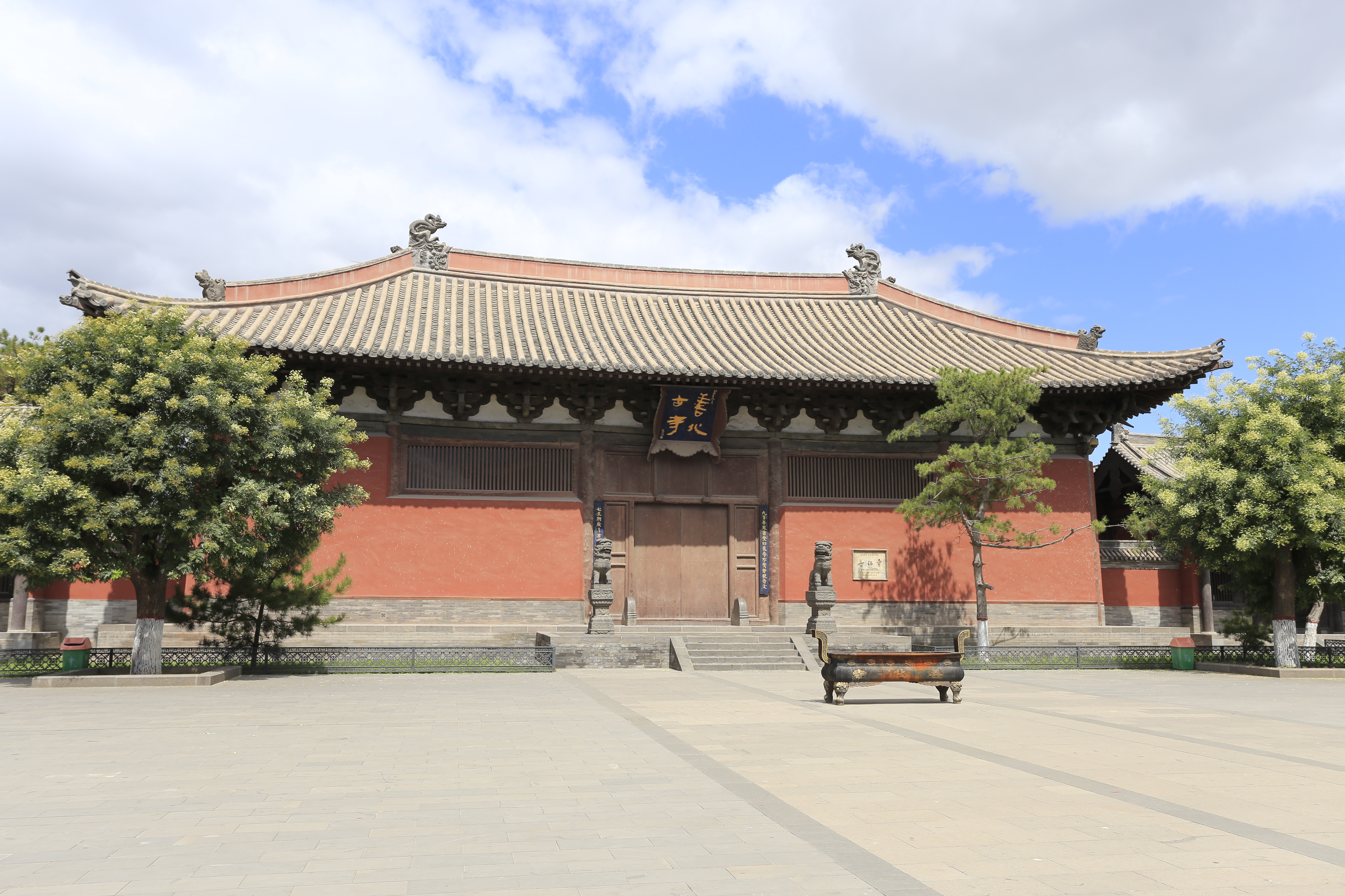 大同善化寺—— 山门